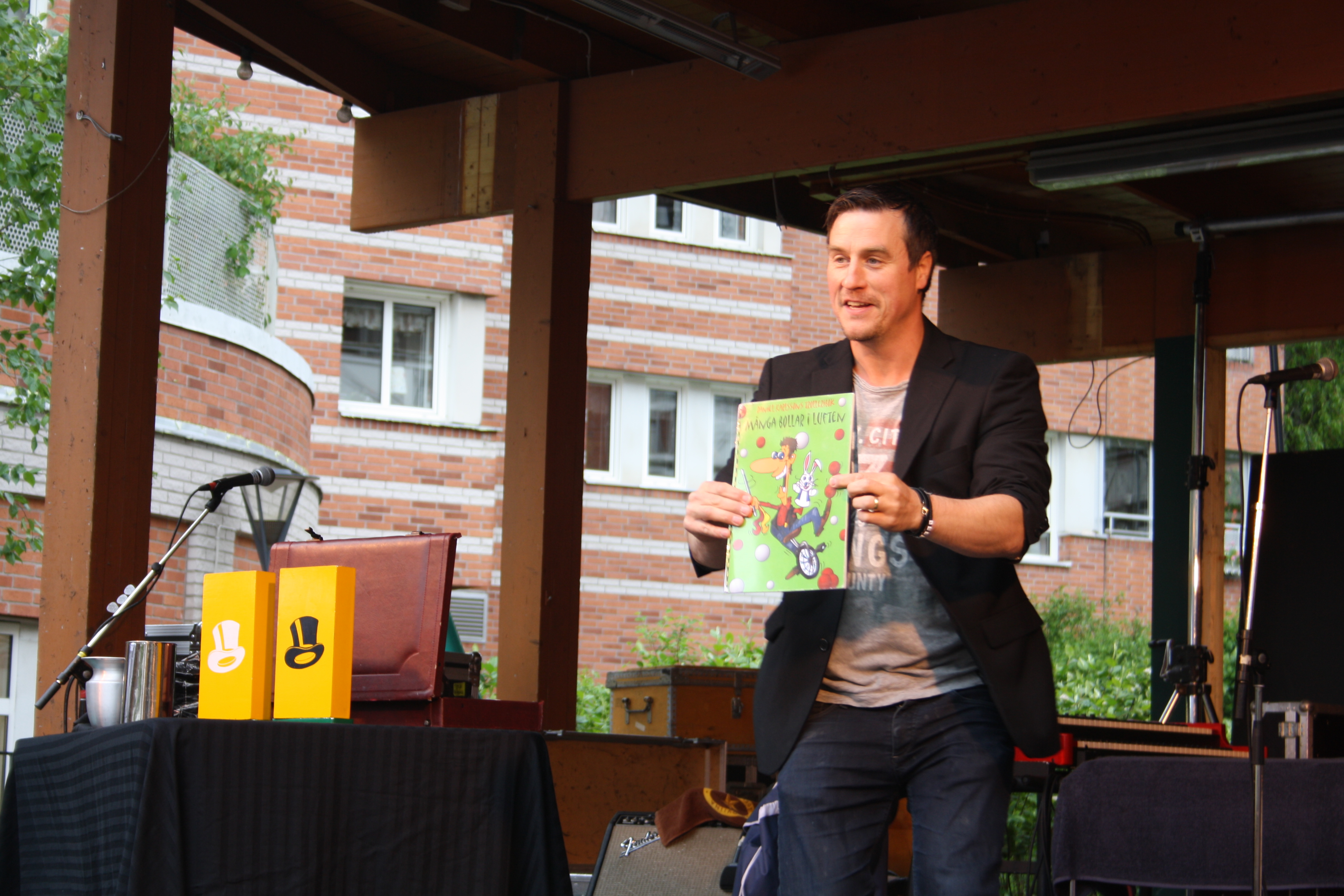 Daniel Karlsson - Huddinge - 26 maj 2016